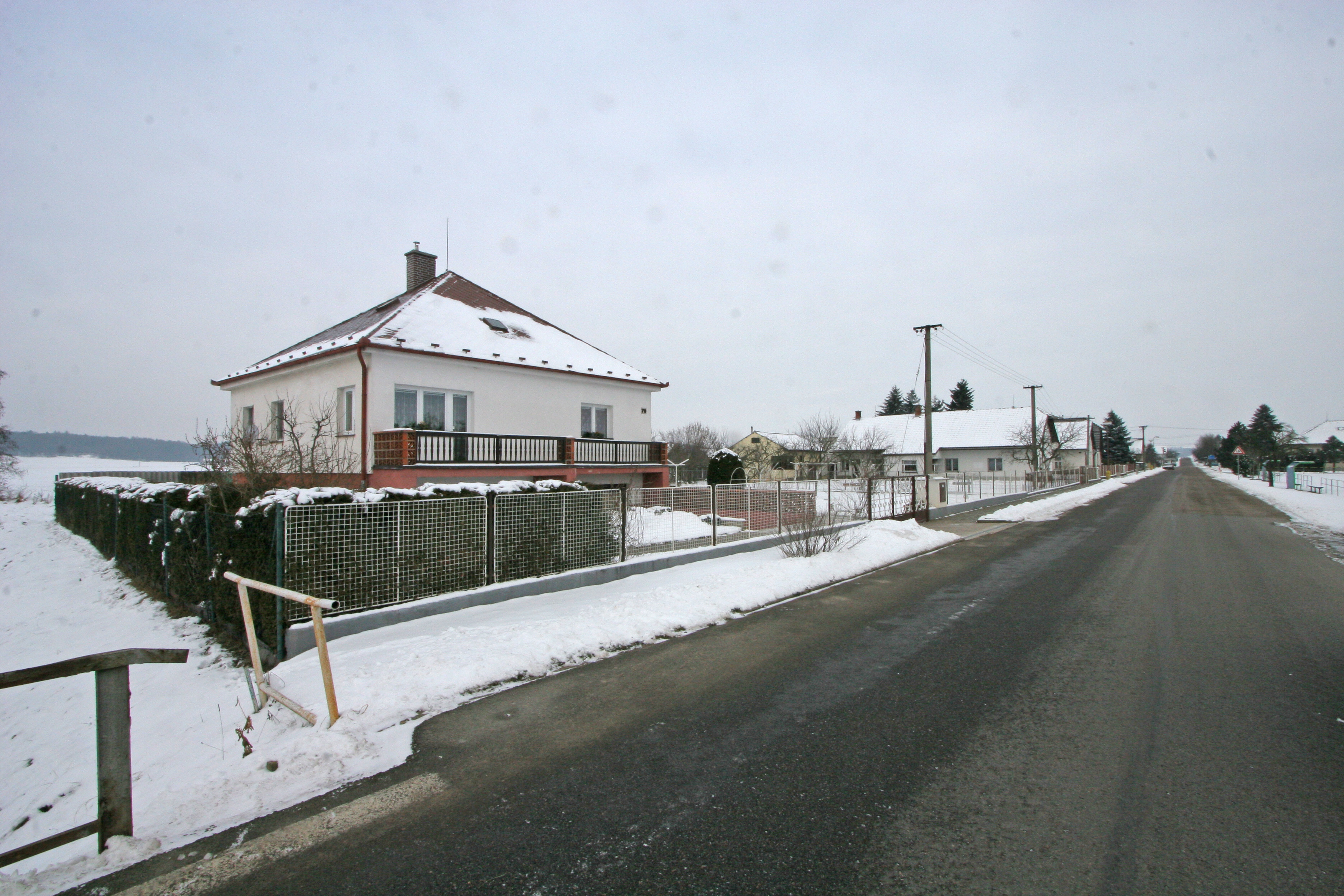 Rohoznice čp. 79